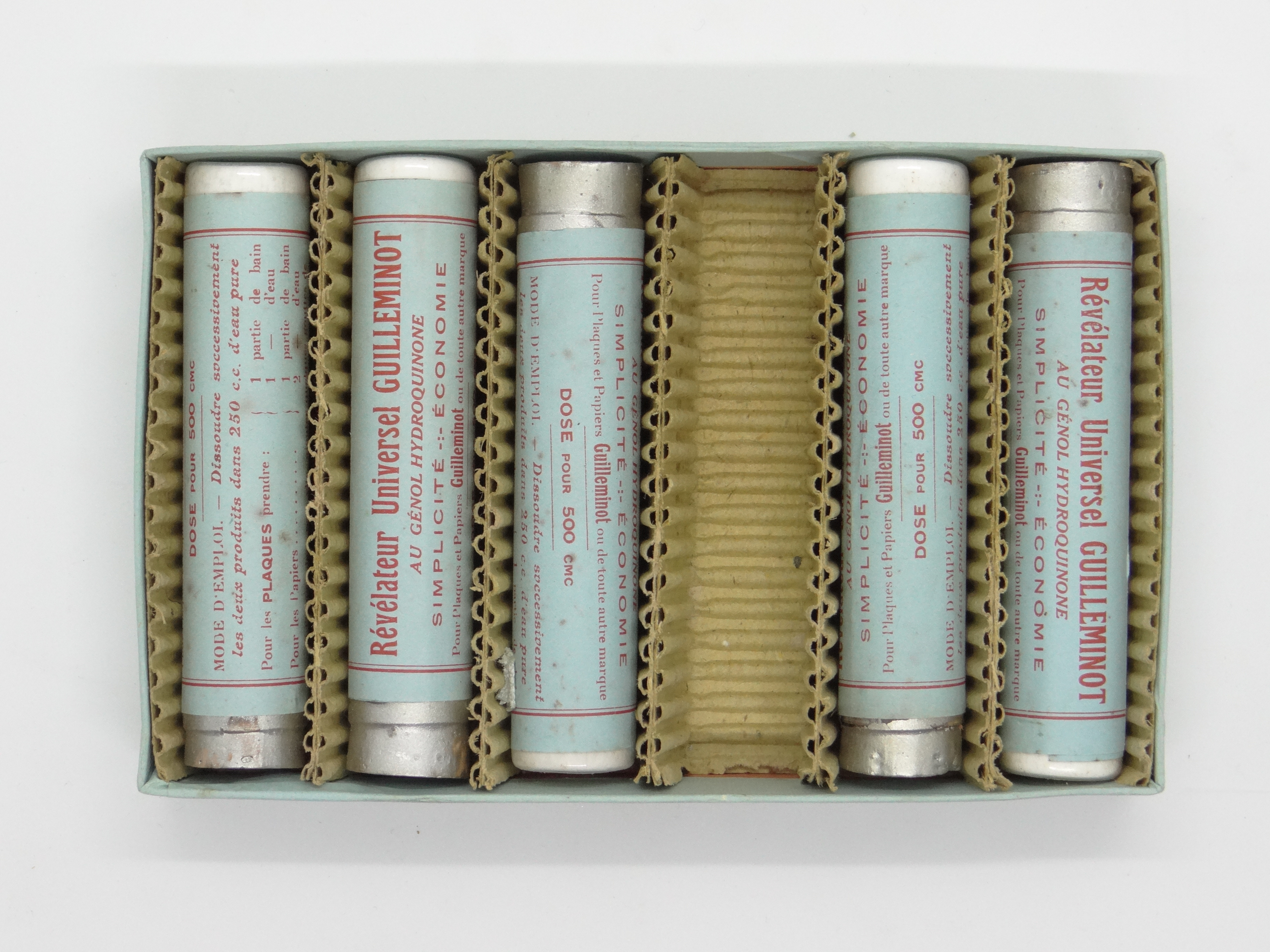 Boîte de 6 capsules / doses de révélateur universel en poudre au génol-hydroquinone commercialisé par la société Guilleminot, Bœspflug et Cie.